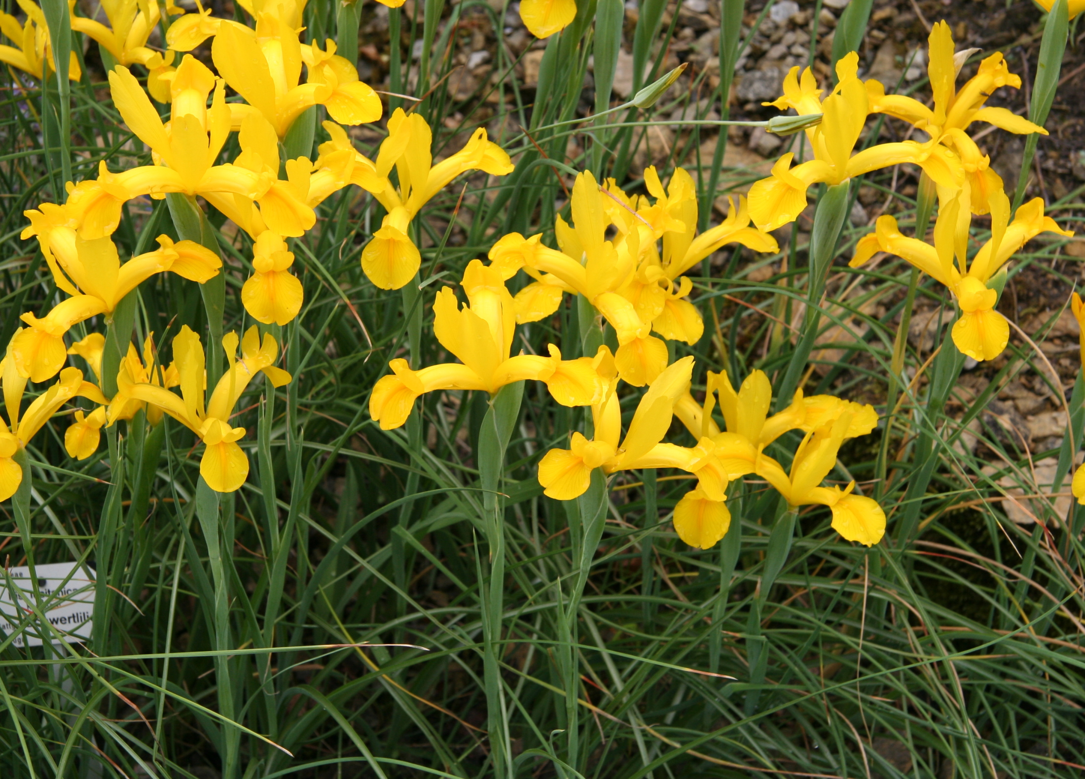 Iris lusitanica im Botanischen Garten Dresden